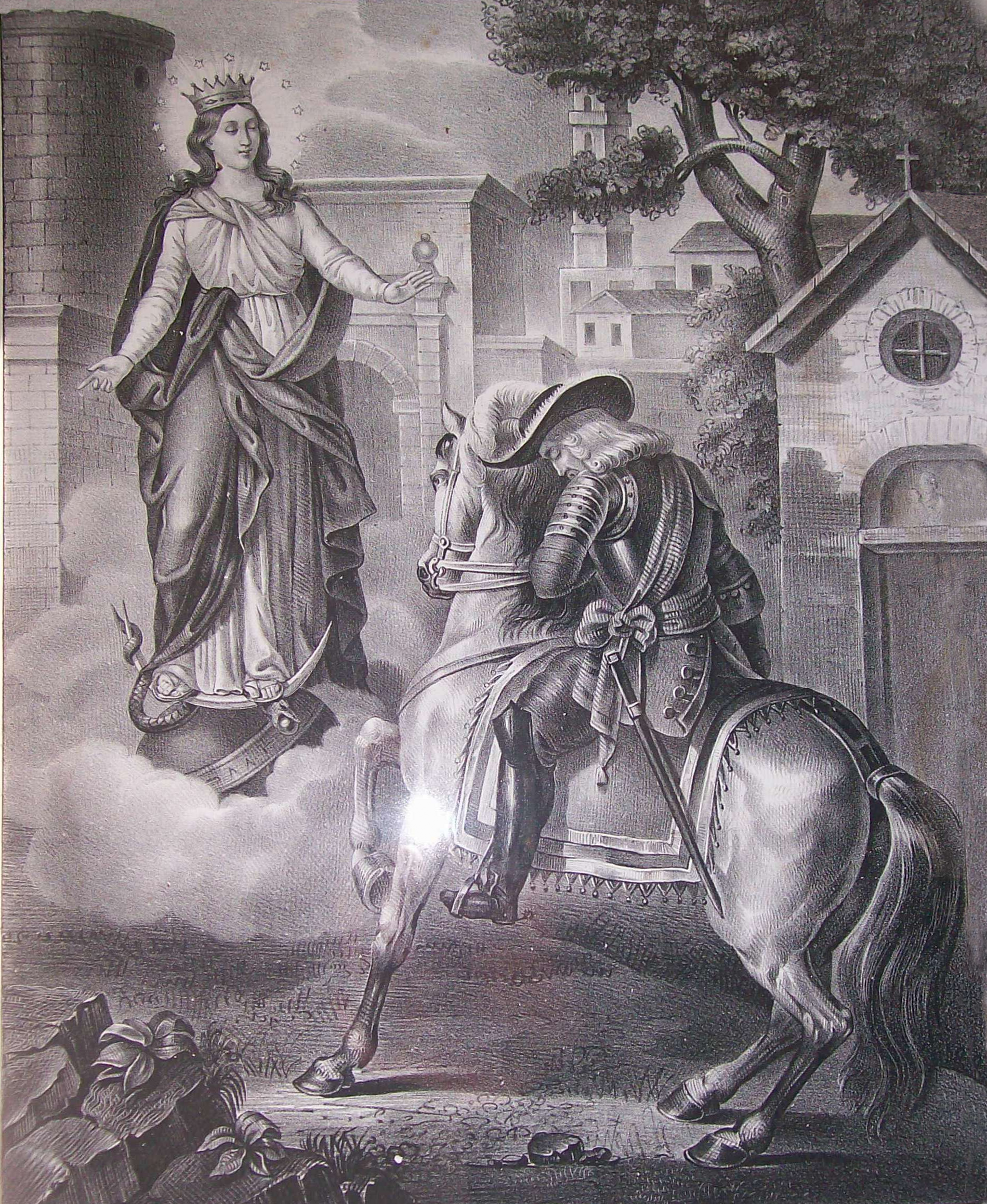 mi son permesso di sistemare il file Madonna Immacolata, creata da Carlo Longo de Bellis